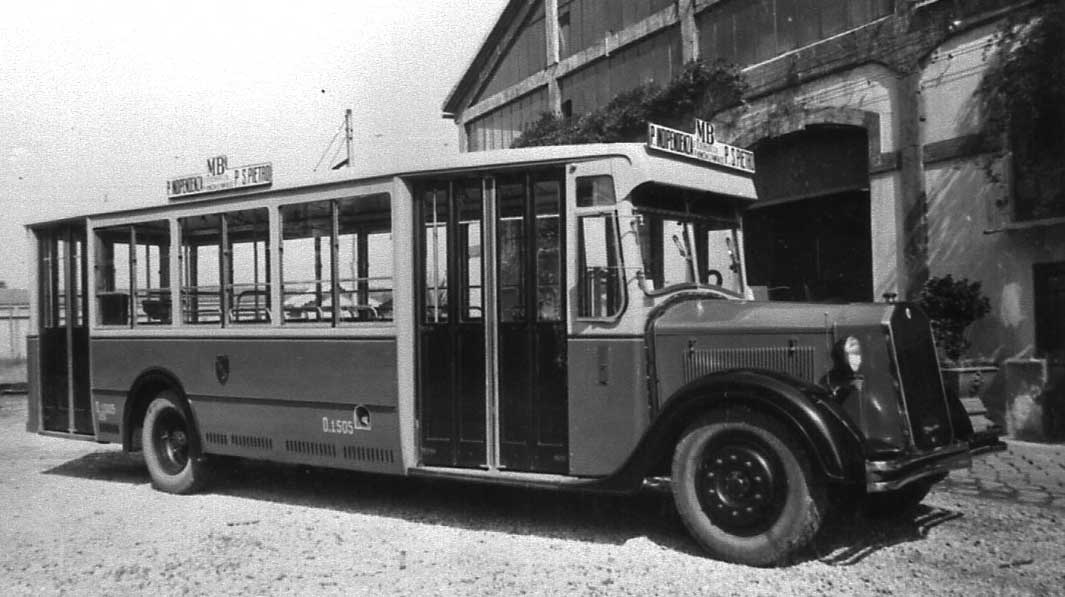 Autobus Lancia Omicron di Roma. Vettura della seconda fornitura.